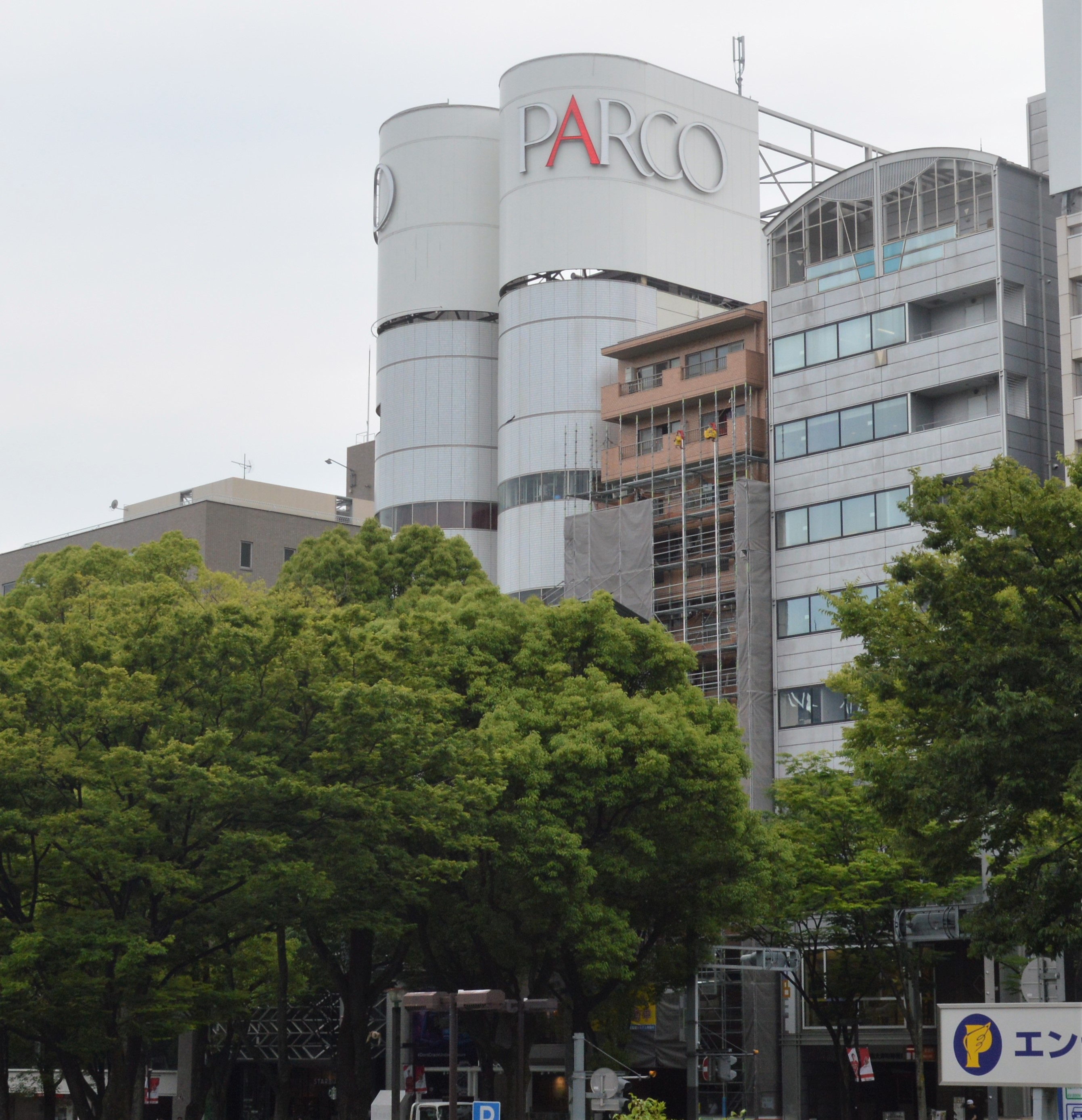 愛知県名古屋市中区にある名古屋パルコ東館。